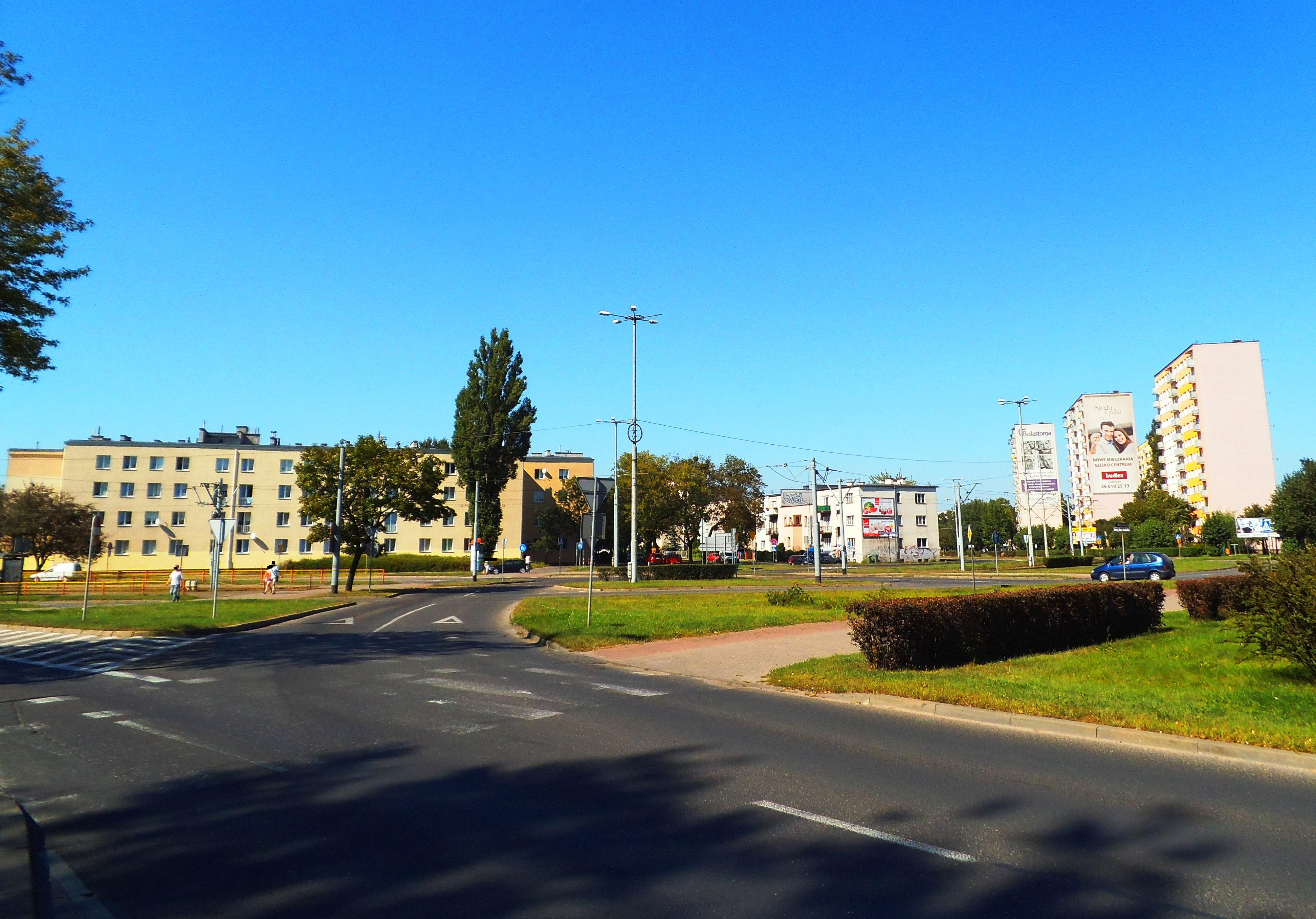 Plac bp. Jana Chrapka w Toruniu1